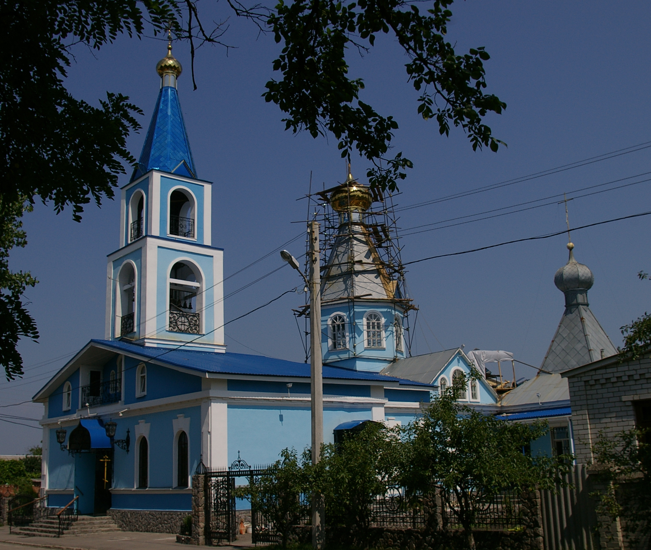 Харьков, Большая Даниловка. Покровская церковь